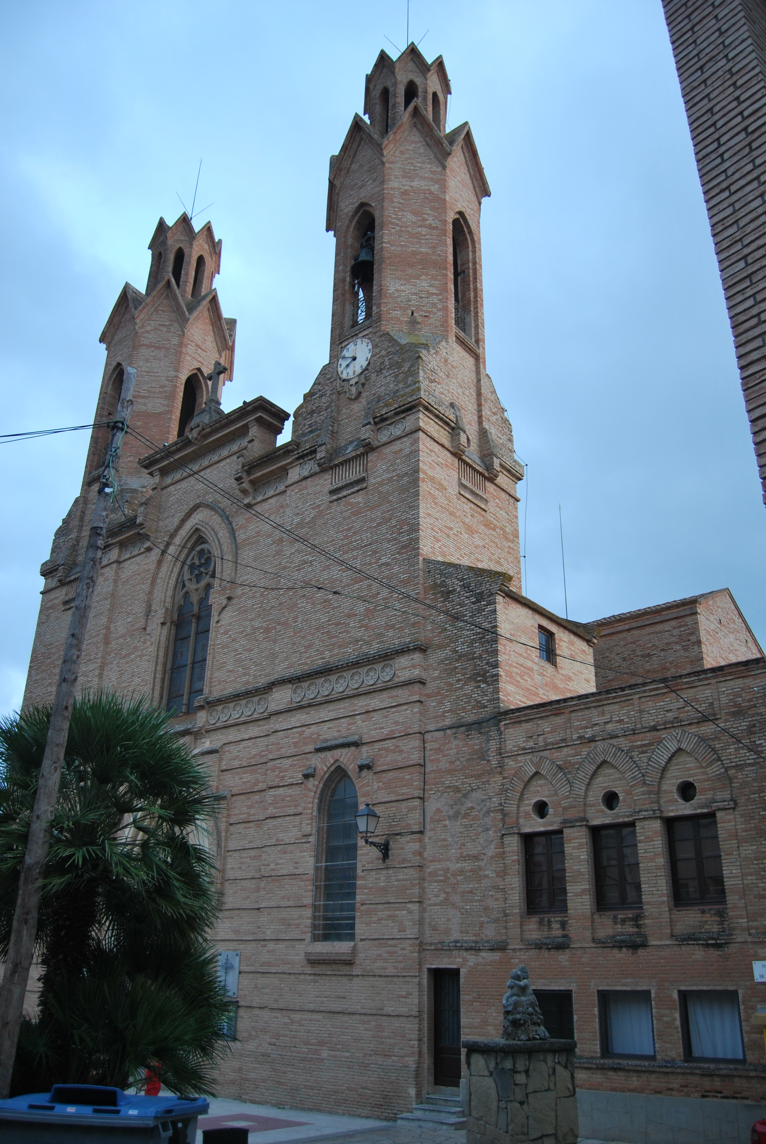 Església parroquial de Sant Esteve (Sant Esteve Sesrovires)